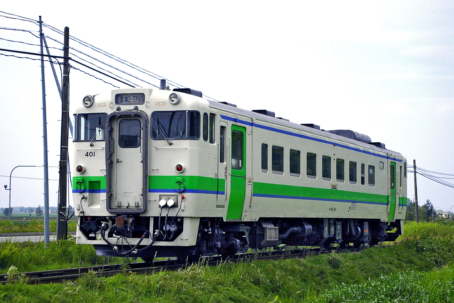 JR Hokkaido KI HA 40 401.